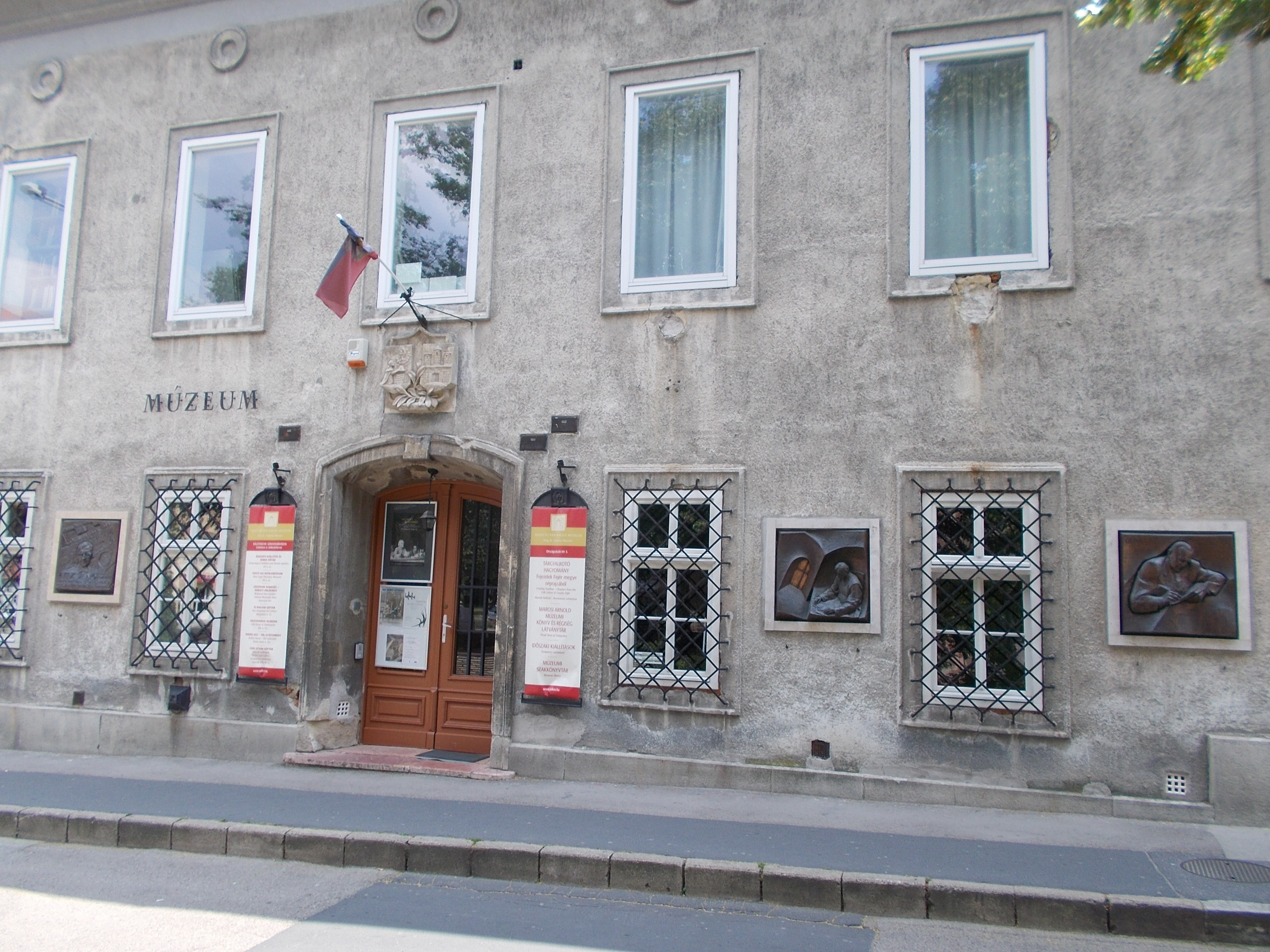 Domborművek a homlokzaton. Balról jobbra Fitz Jenő ókortörténész, régész (Nagy Benedek, 2014, bronz.), Fejér megye és Székesfehérvár címerei az ún.Kettős címer (1938). Marosi Arnold (Nagy Benedek, 2011, bronz), Gunda Béla etnográfus (Nagy Benedek, 2012, bronz). Szent István Király Múzeum Székesfehérvár. Saroképület. - Magyarország, Fejér megye, Belváros, Székesfehérvár, Országzászló tér 3., Várkörút